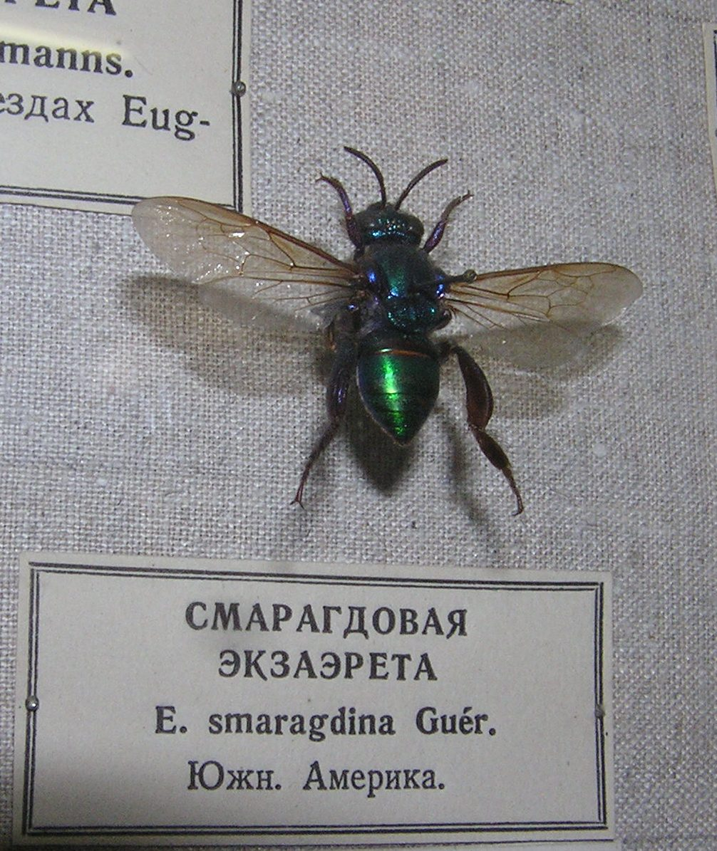 Зоологический музей в Санкт-Петербурге. Смарагдовая эзаэрета